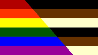 Variante du Drapeau de la communauté Bear